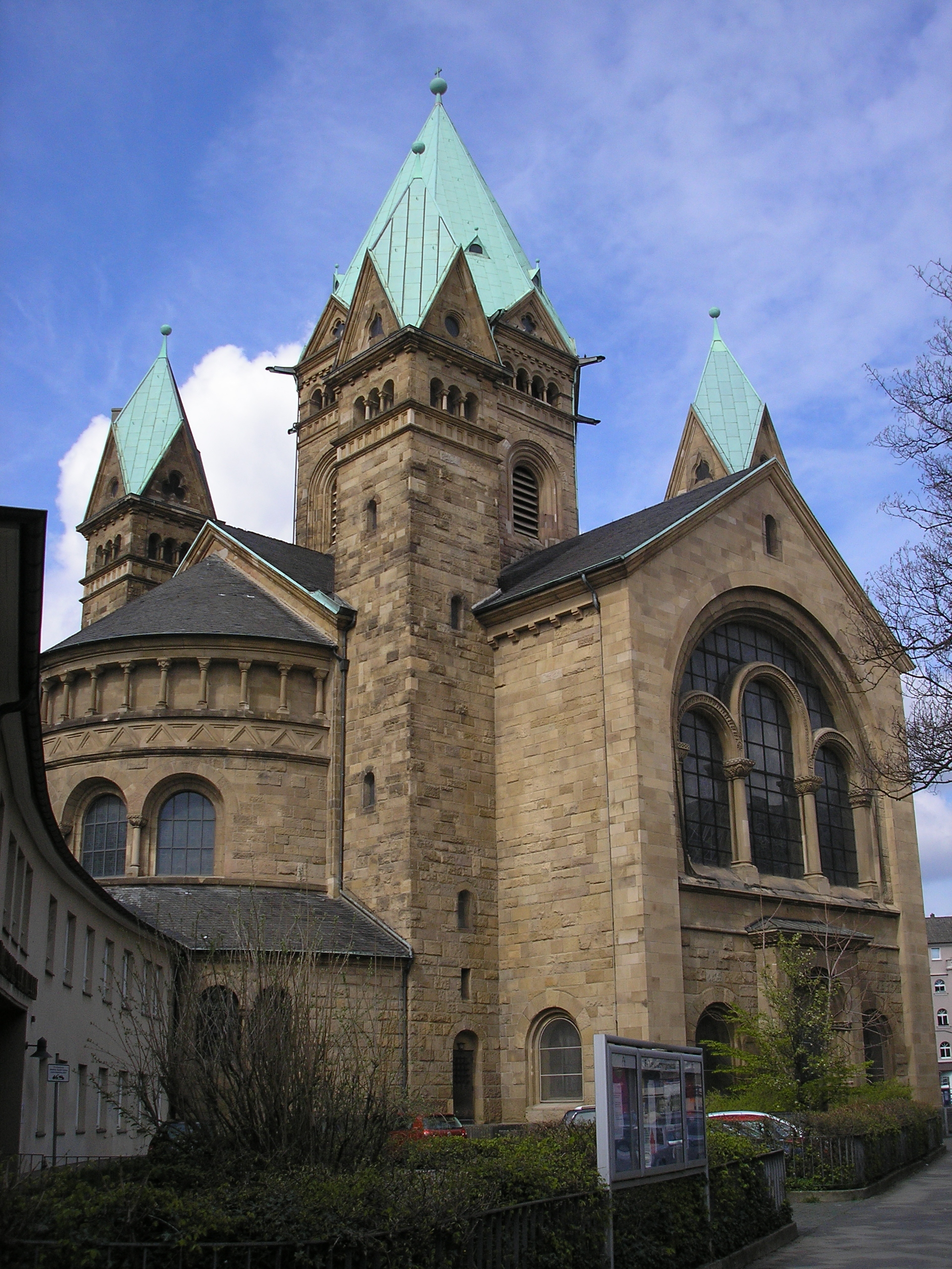 Kreuzkirche Düsseldorf (Seitenansicht)